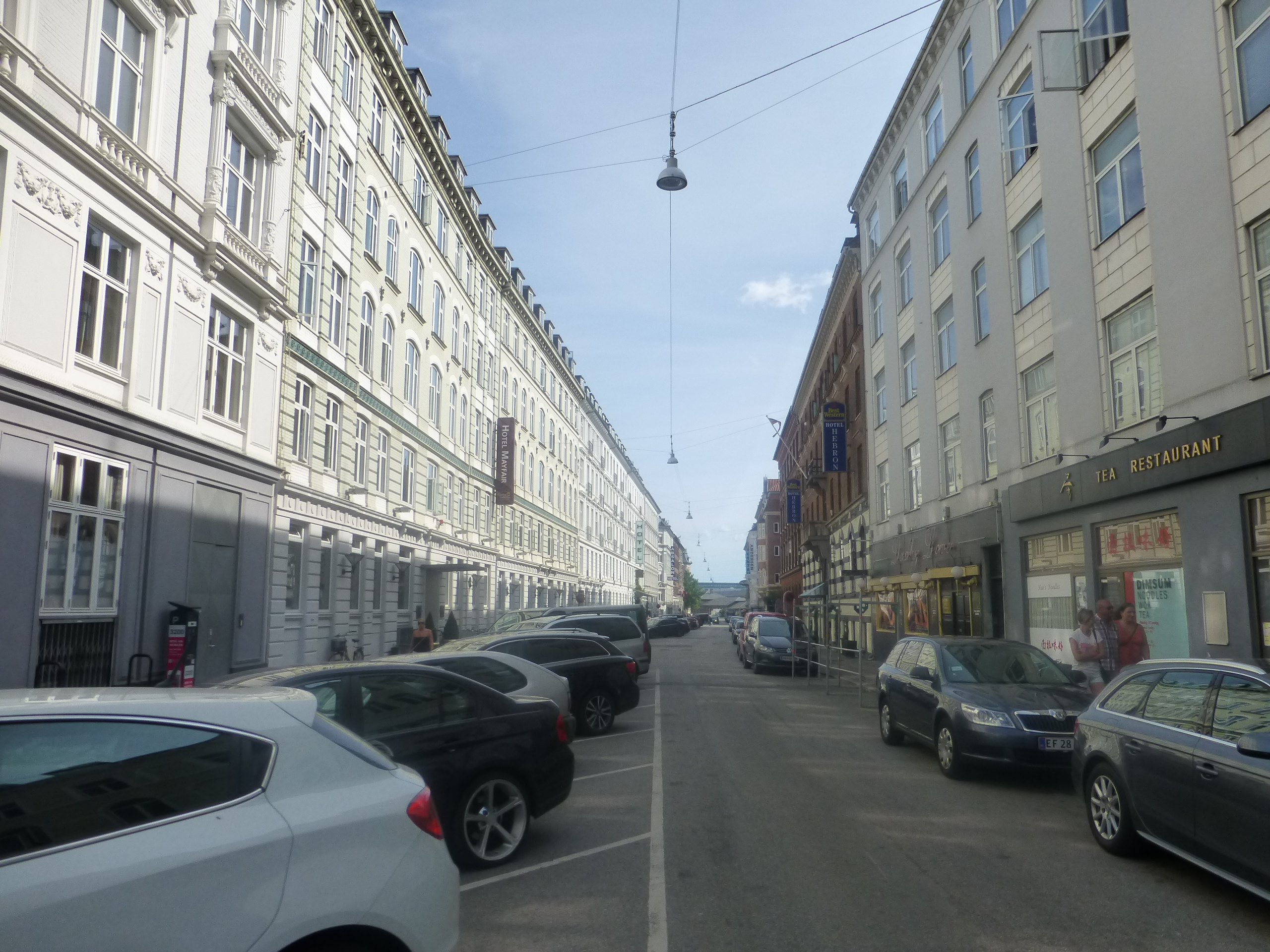 The street Helgolandsgade in Vesterbro in Copenhagen.